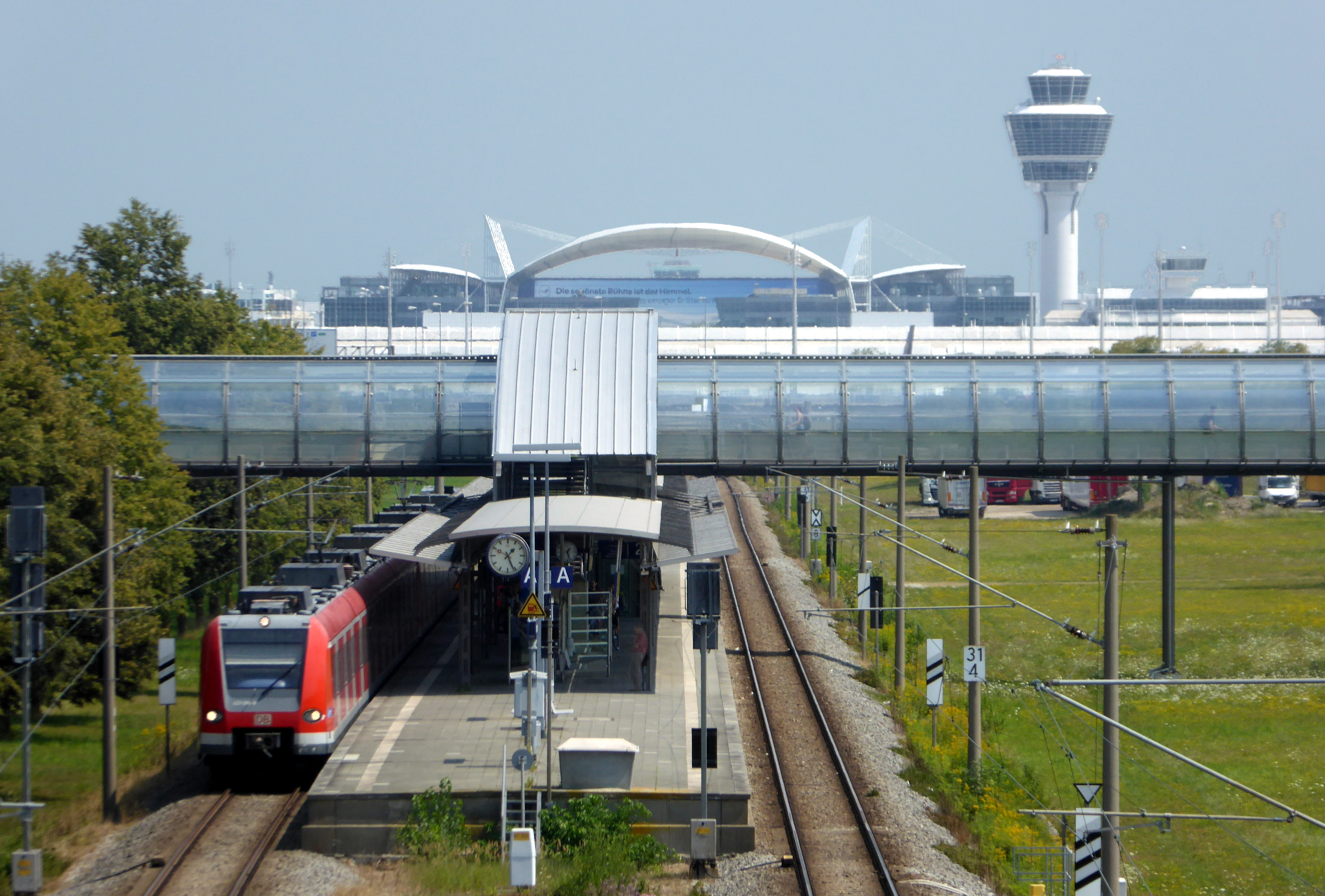 München, S-Bahnhof Besucherpark (des Flughafens) von Westen gesehen.